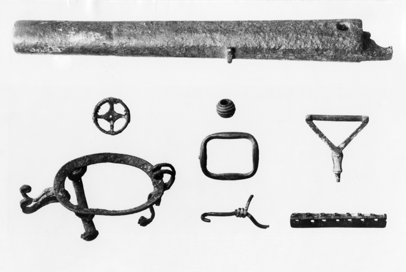 Bronsföremål funna omkring 1885 vid Sandviks gård, Järfälla. Föremålen funna vid plöjning i en åker och en gevärspipa (överst i bilden) funnen mellan Gåsberget och Sandvik av fru Margit Kruse. Beskrivning av bronsföremålen: a) hjul b) underrede till vagn c) pärla av spirallagd trind tråd d) spänne e) ögla till hänge f) smycke som utgöres av en triangulär ram med ett balusterformat utsprång g) kedjedelare.